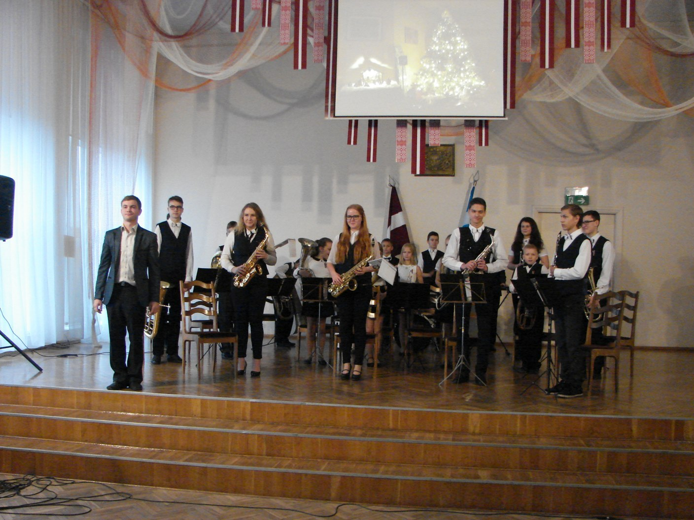 Rēzeknes 5. vidusskolas pūtēju orķestris 2014